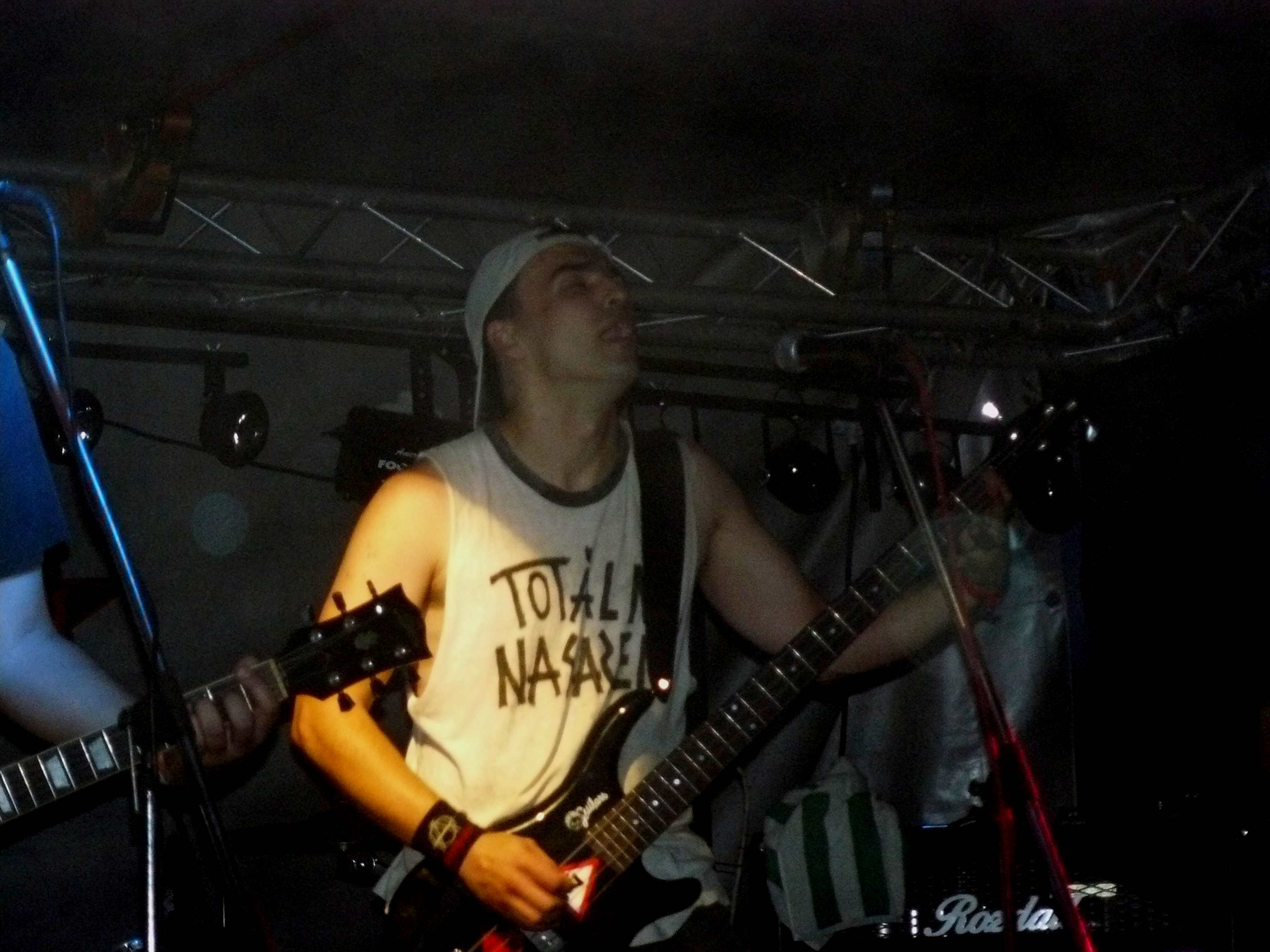 Sváťa z Totálního nasazení